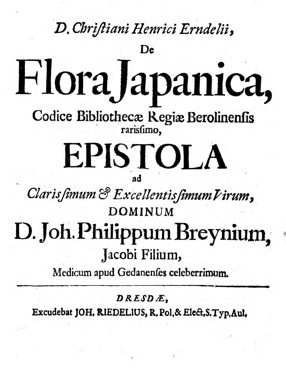 De flora Japonica, Codice bibliothecae Regiae Berolinensis rarissi*. - 1716 von Christian Heinrich Erndtel